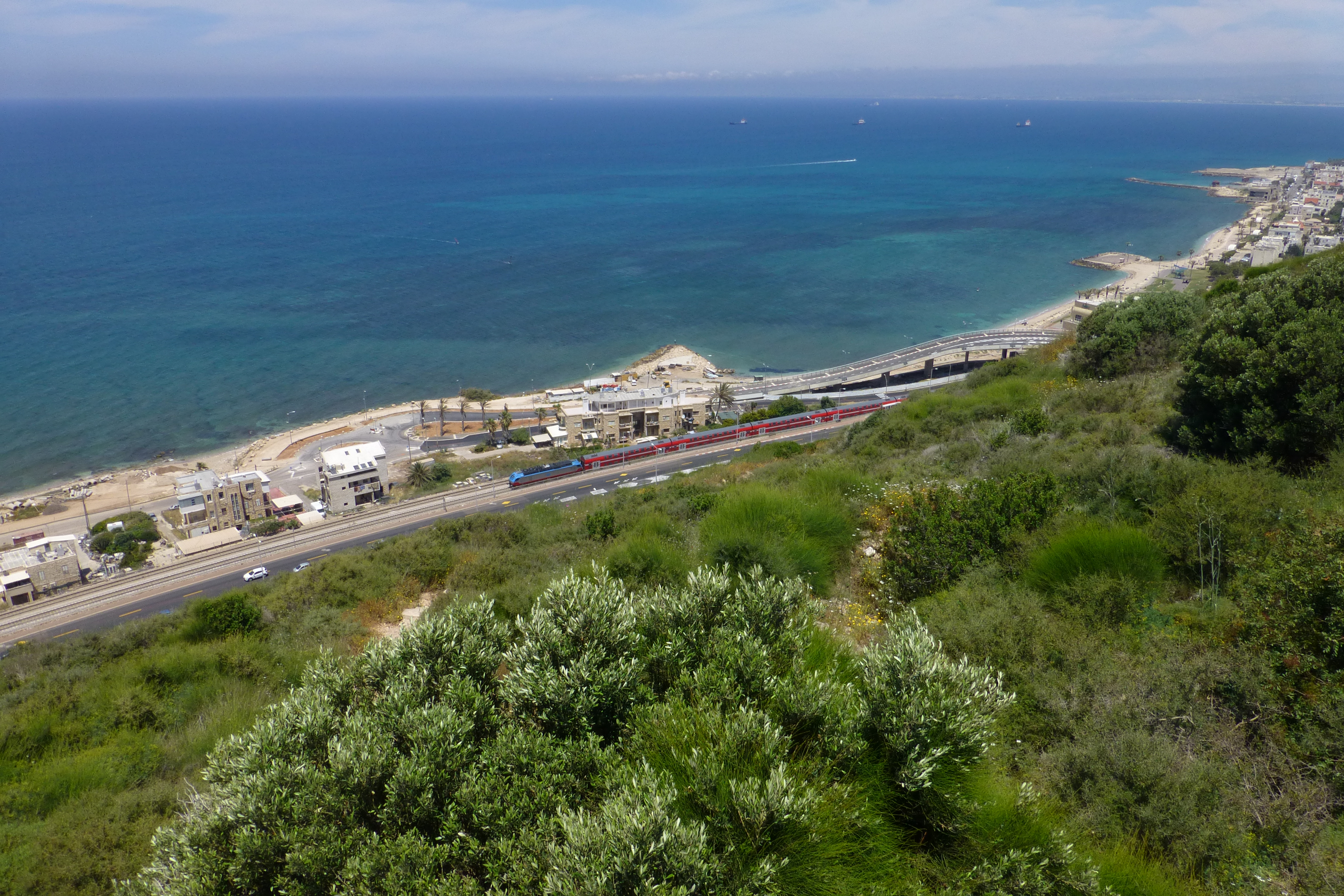 קזינו בת גלים היה מבנה בשכונת בת גלים בחיפה ששימש לפעילויות קהילה ופנאי משנות ה-30 של המאה ה-20, אך נהרס לאחר שנים, וכיום ניצב במקומו שלד בטון. חרף שמו, לא שימש המקום מעולם כקזינו.